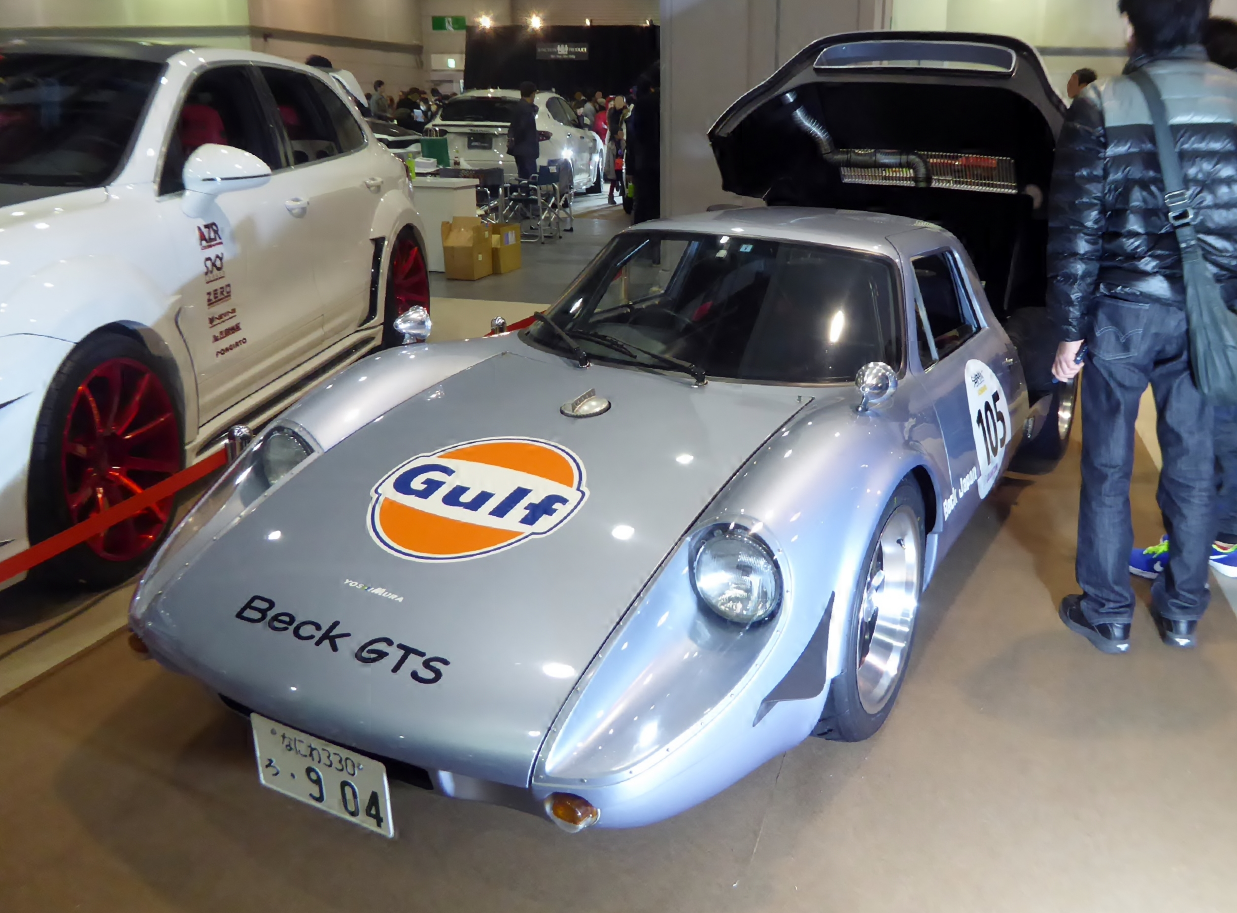 大阪オートメッセ2017に於いてBeck GTSを撮影。